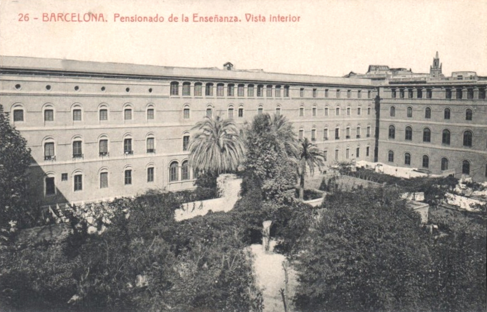 Pensionado de la Enseñanza, Barcelone, avant 1914. Carte postale ancienne.